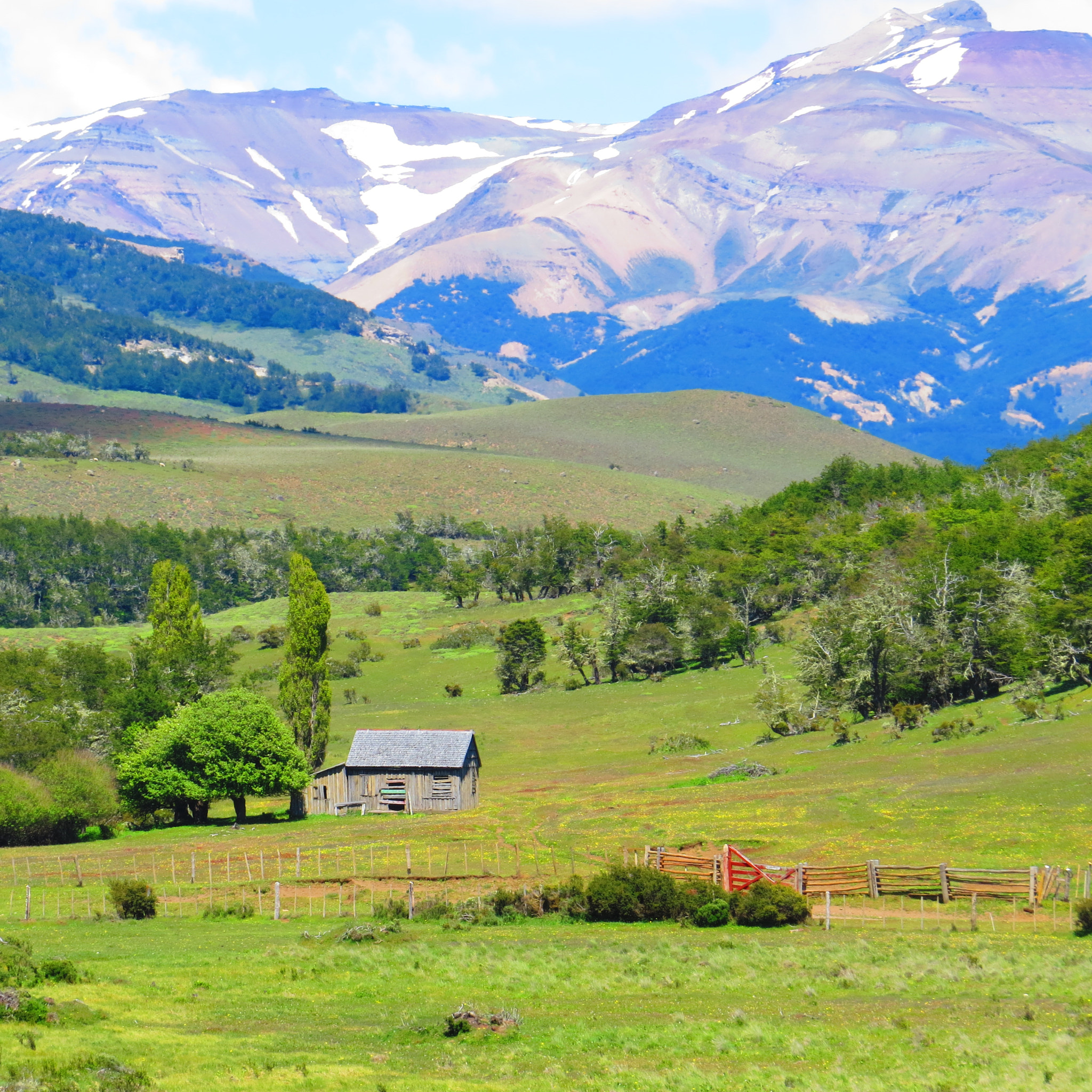 500px provided description: Peque?a casa ubicada en Estancia La Frontera en Balmaceda,en la mitad del campo con hermosa vista a la cordillera [#Patagonia ,#Estancia ,#Balmaceda]